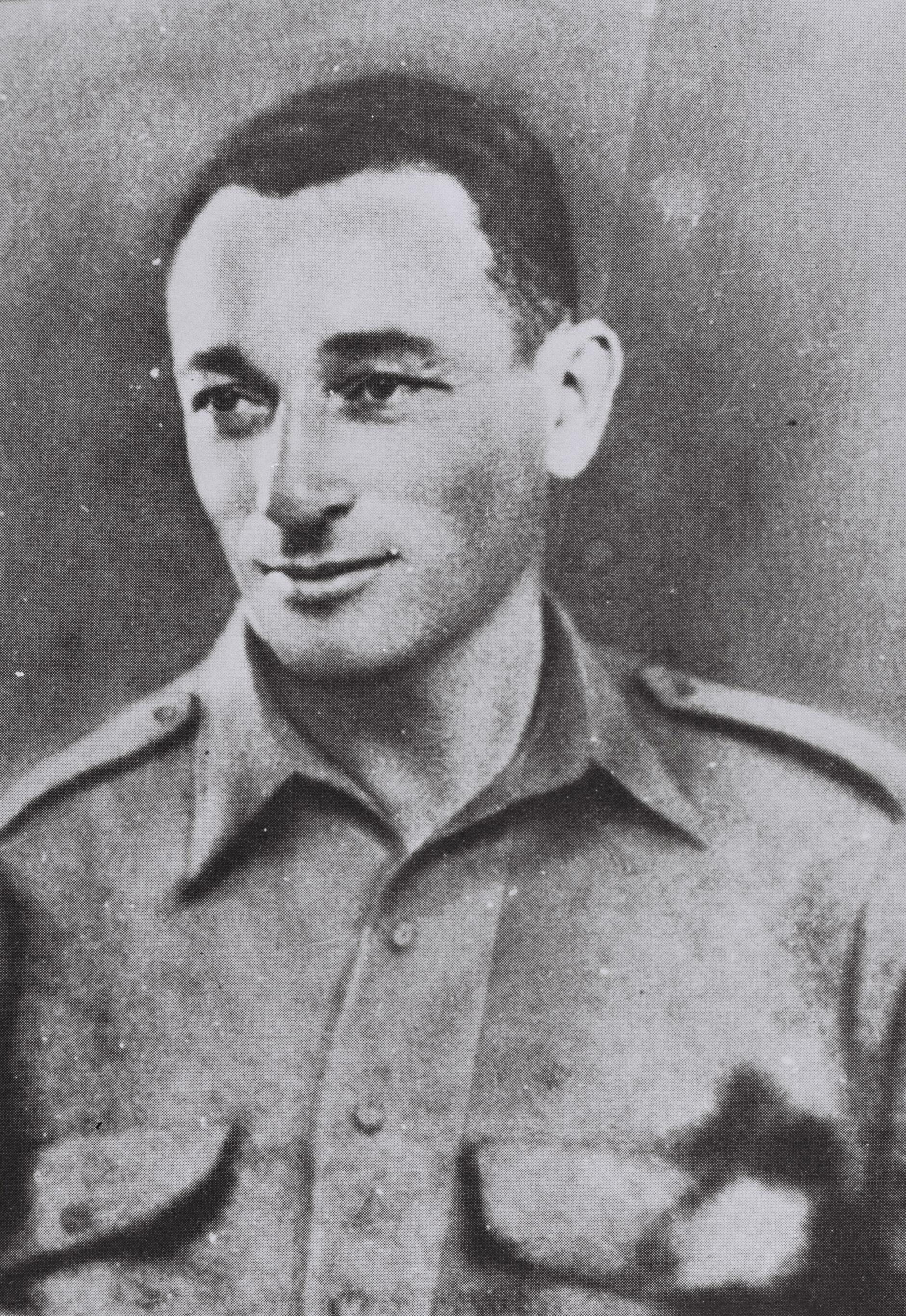 דב גרונר